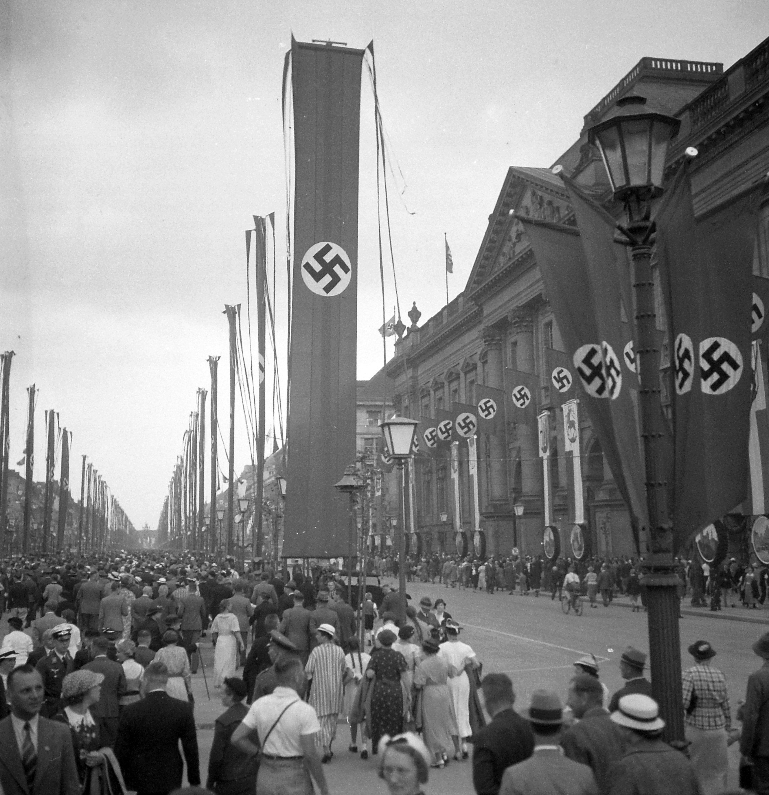 Unter den Linden, jobbra a Staatsbibliothek, háttérben a Brandenburgi kapu. Location: Germany, Berlin Tags: swastica, Olympics, flag Title: Unter den Linden, jobbra a Staatsbibliothek, háttérben a Brandenburgi kapu.